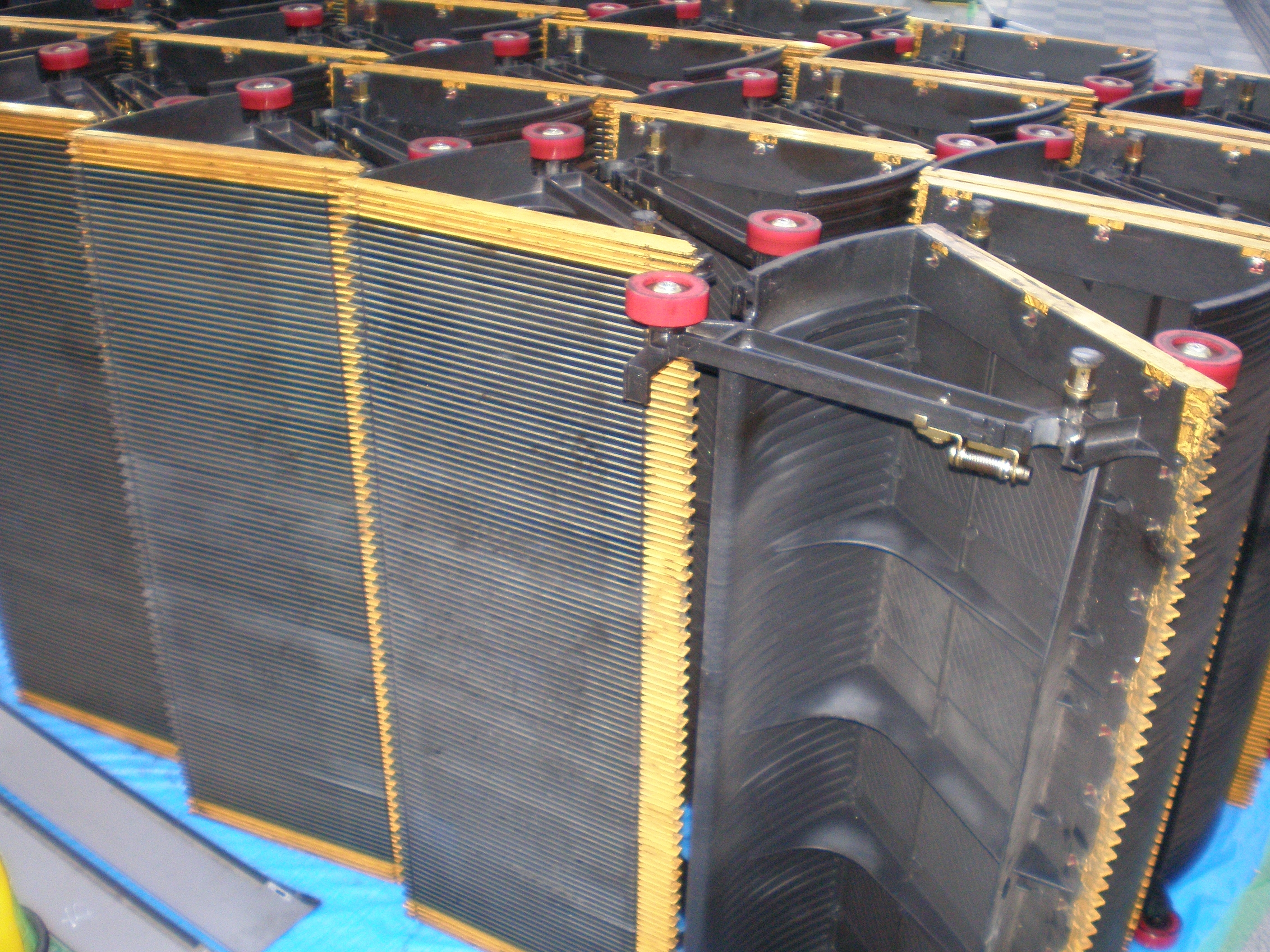 Escalator Steps